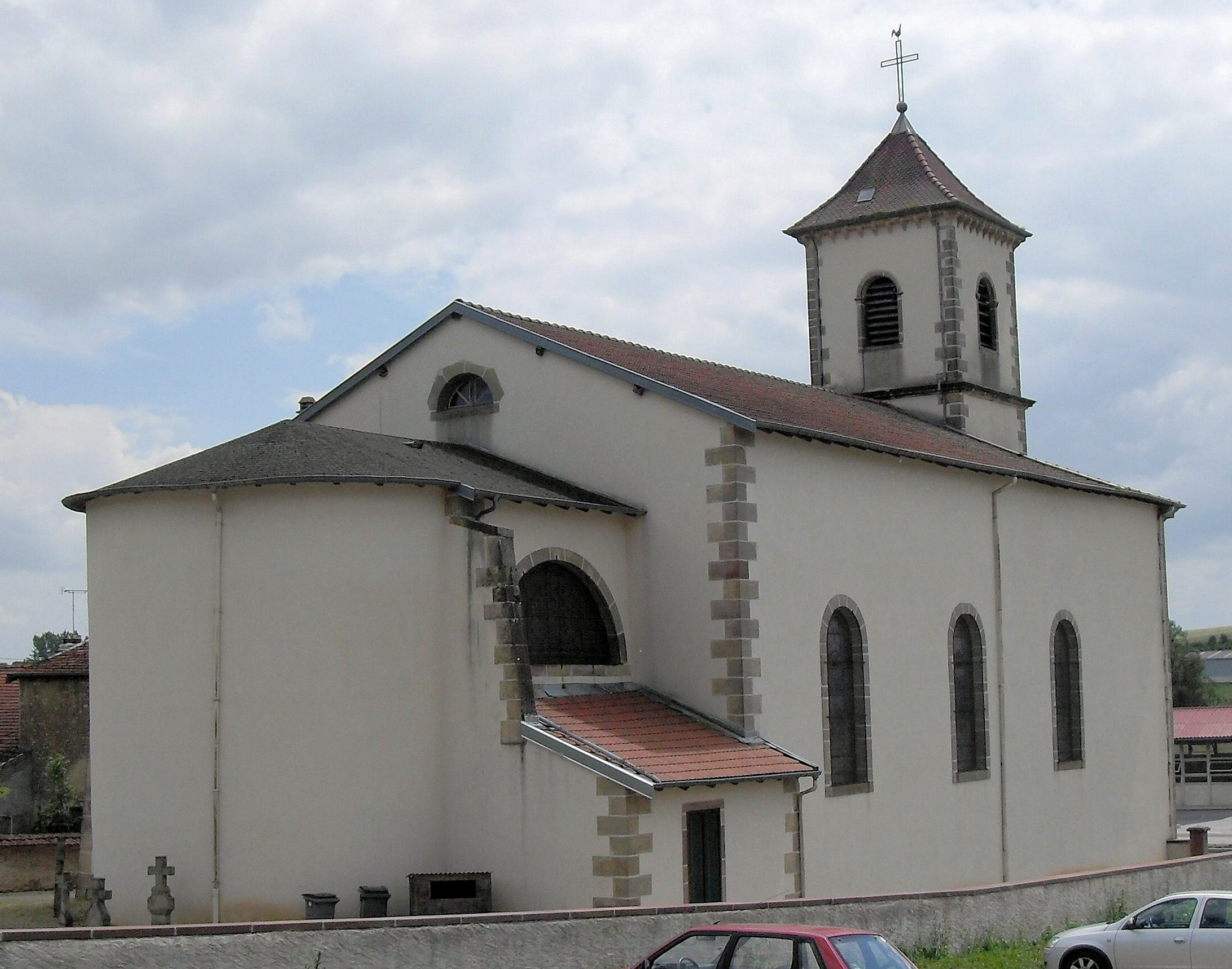 L'église Saint-Philippe à Velotte-et-Tatignécourt